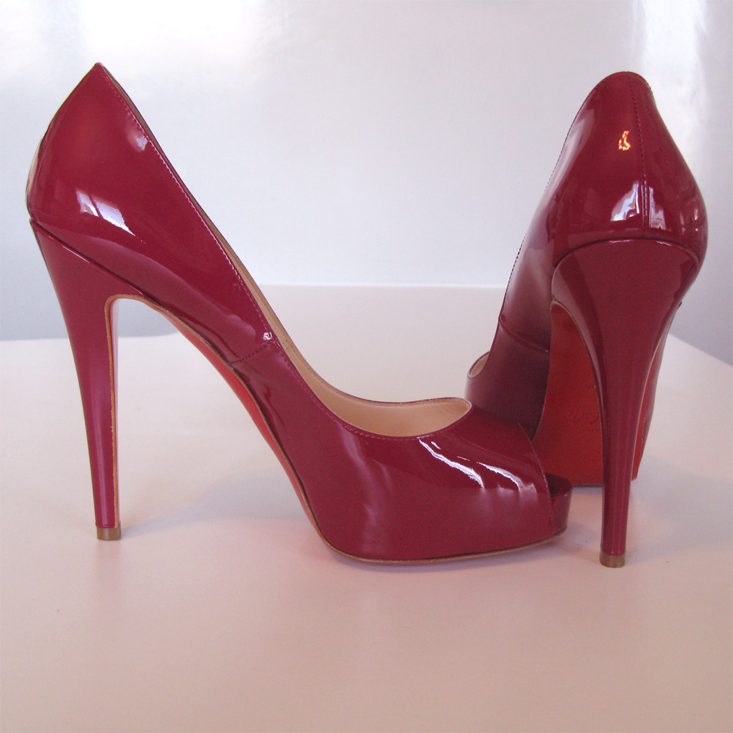 escarpin femme en cuir verni rose, à talon aiguille de 120mm, peep-toe, avec plateforme de 20mm environs